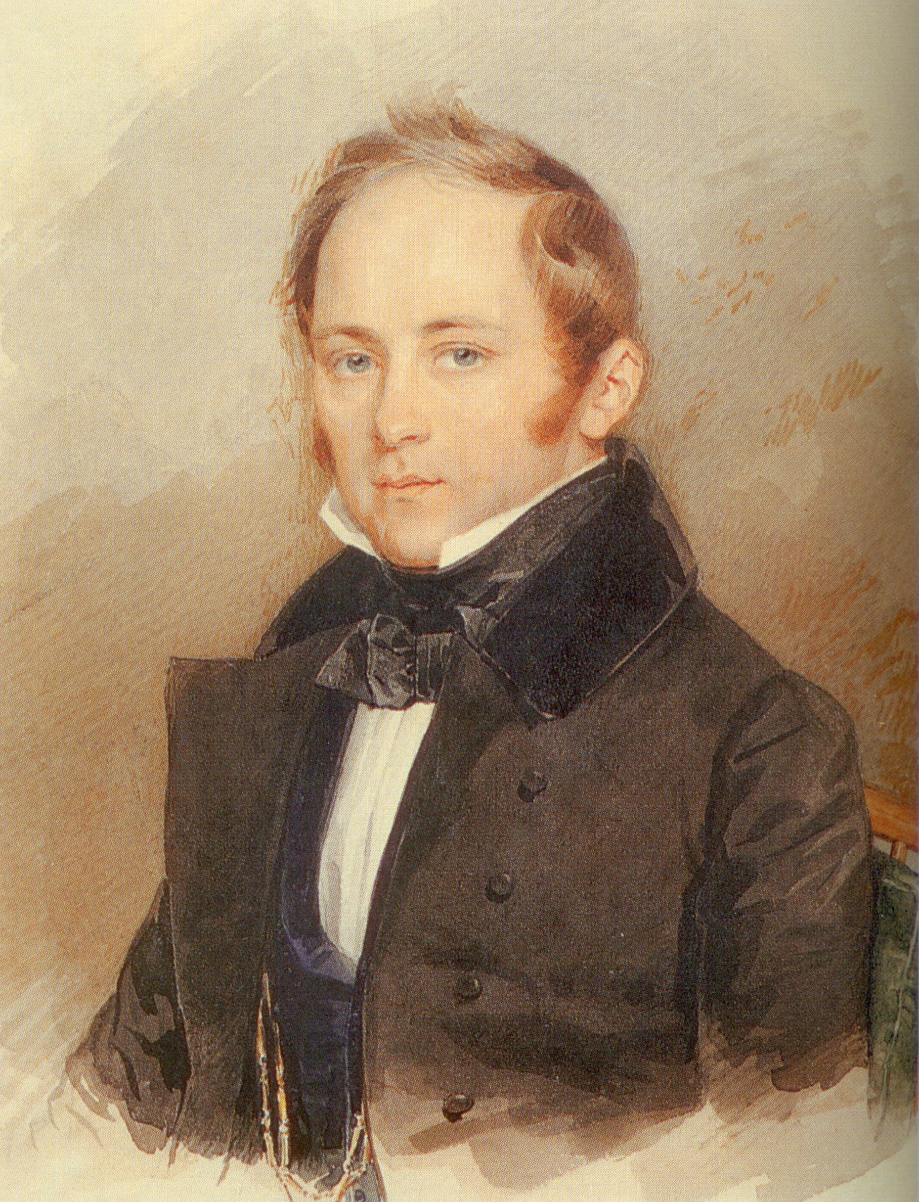 Соколов Петр Федорович. Портрет А.А. Бобринского. 1830-е гг